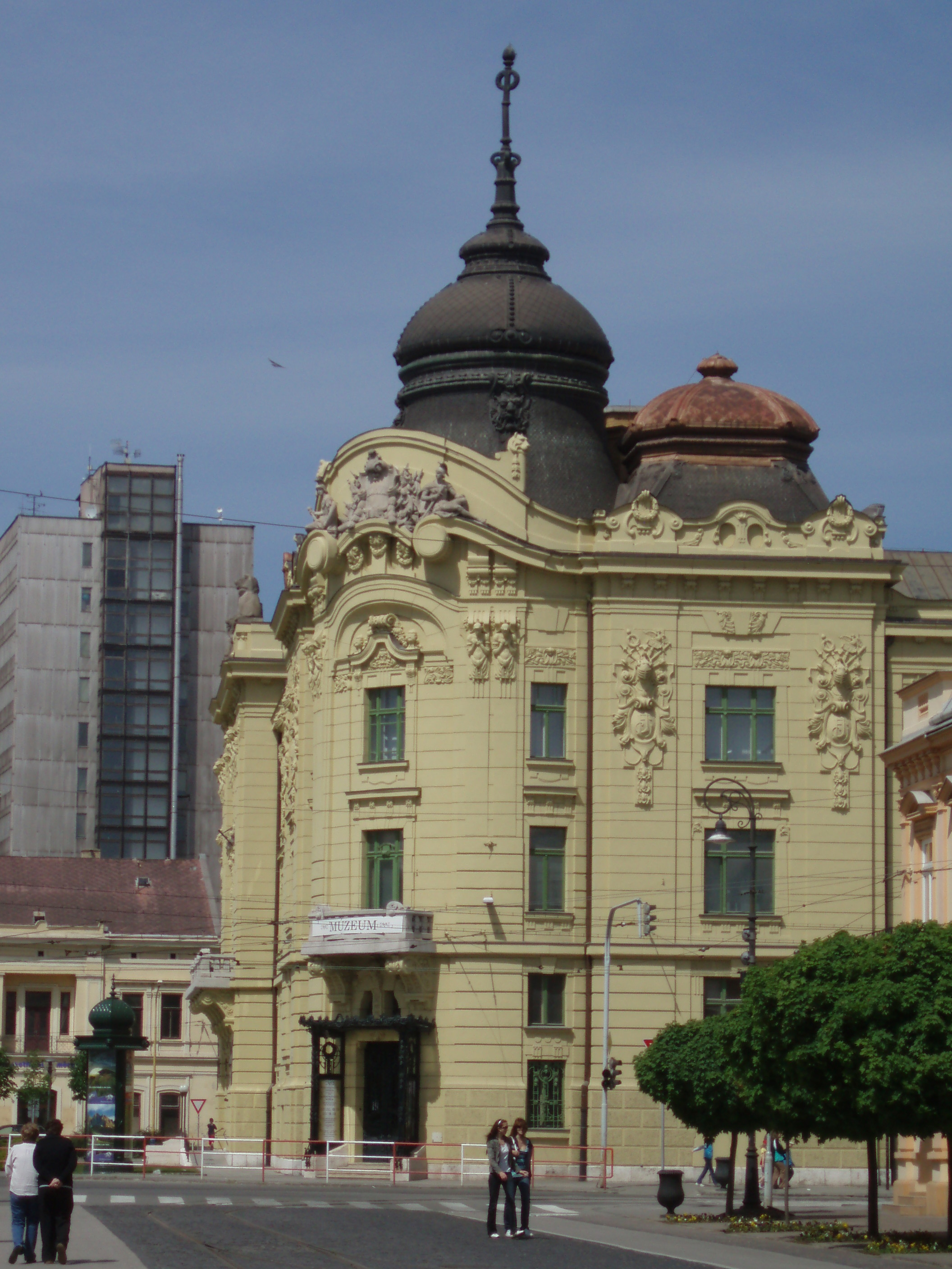 divizia z hlavnej